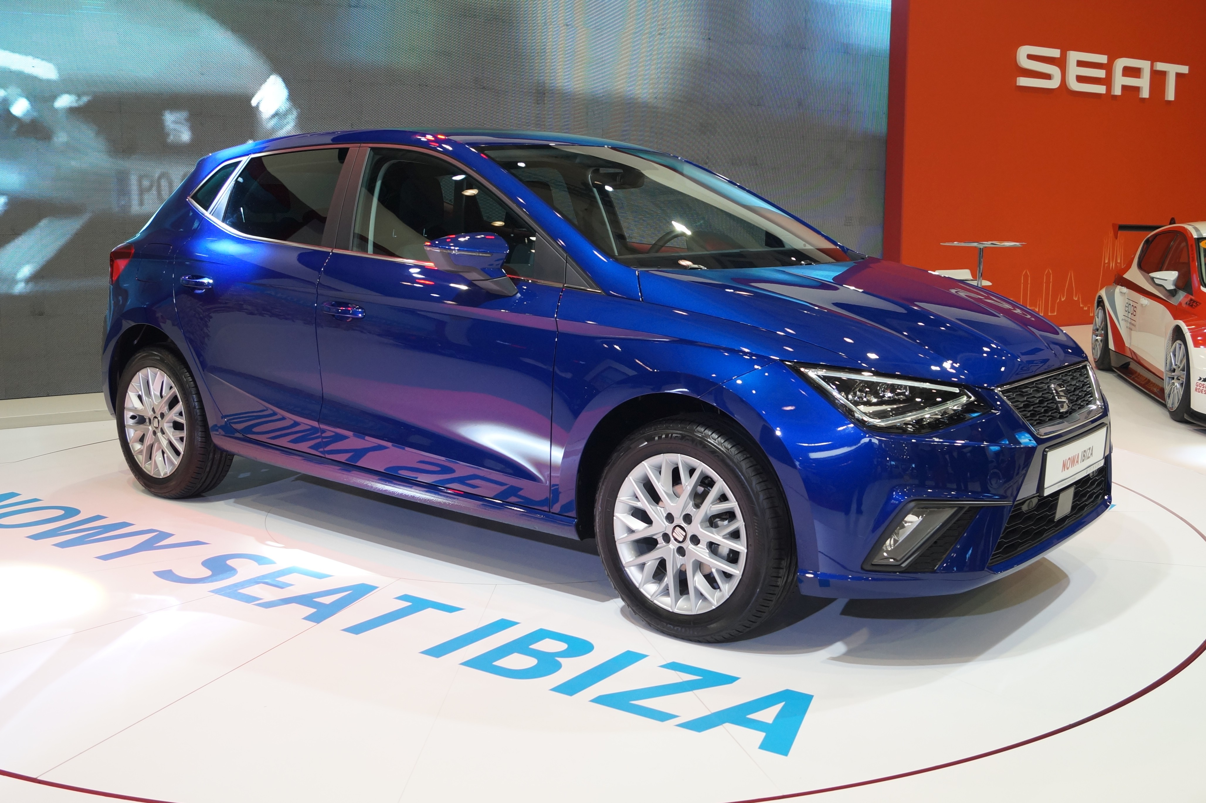 Prawy przód SEATa Ibizy V generacji na Motor Show Poznań 2017.